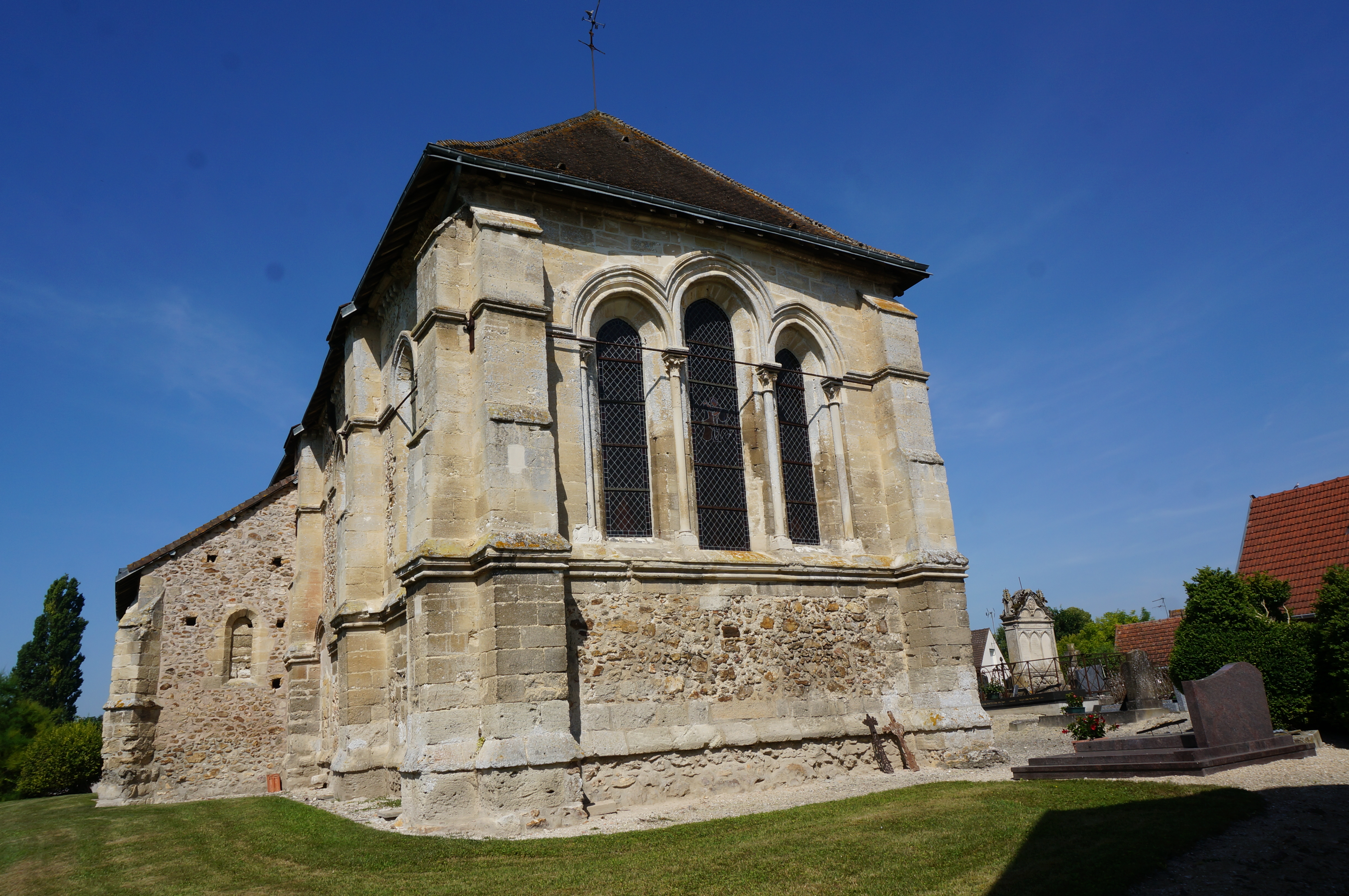 vue de l'Église d'Isse .